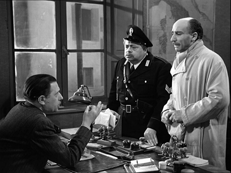 Screenshot del film Guardie e ladri (1951) diretto da Mario Monicelli e Steno